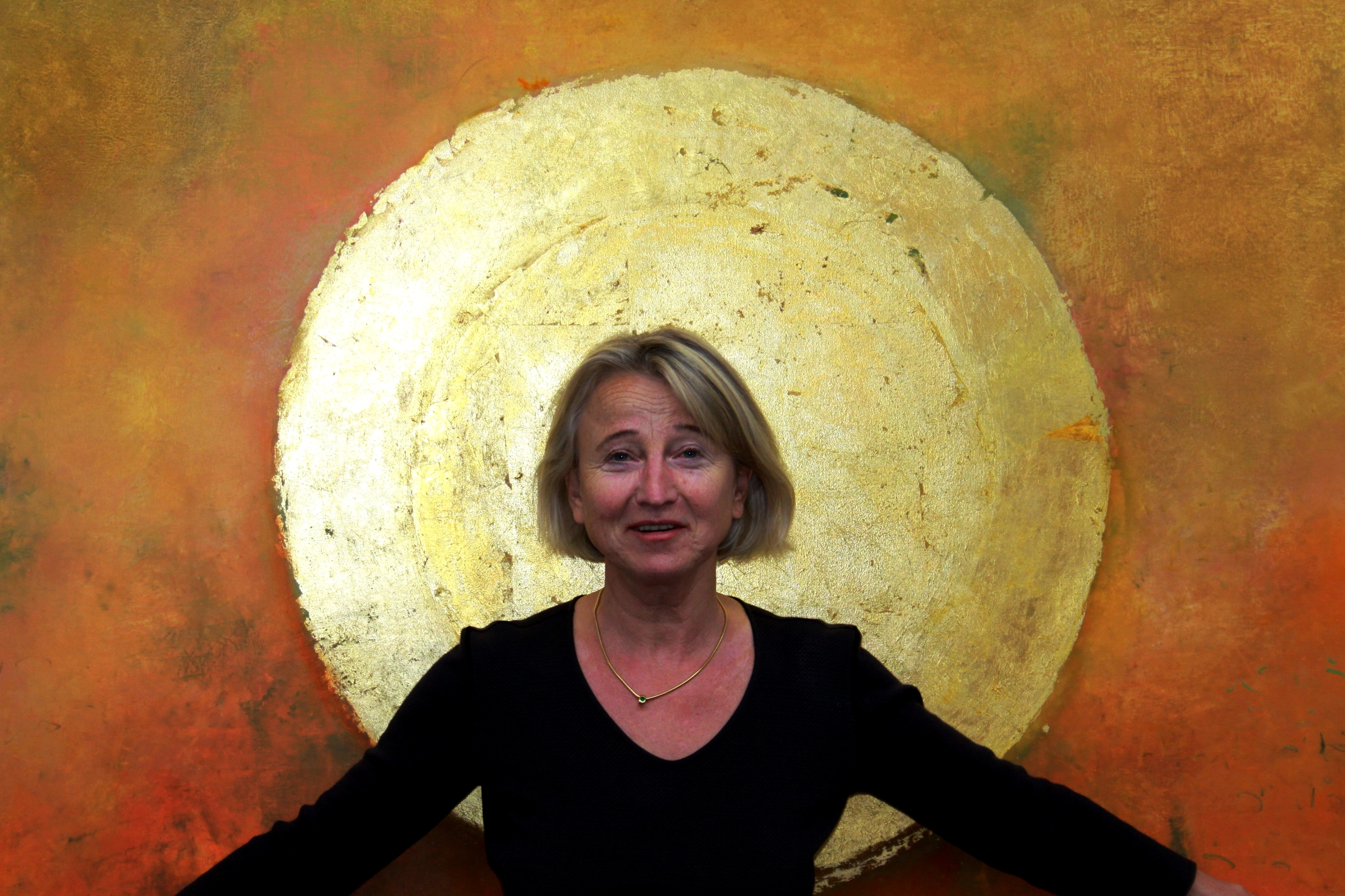 Sabine Beuter im Atelier